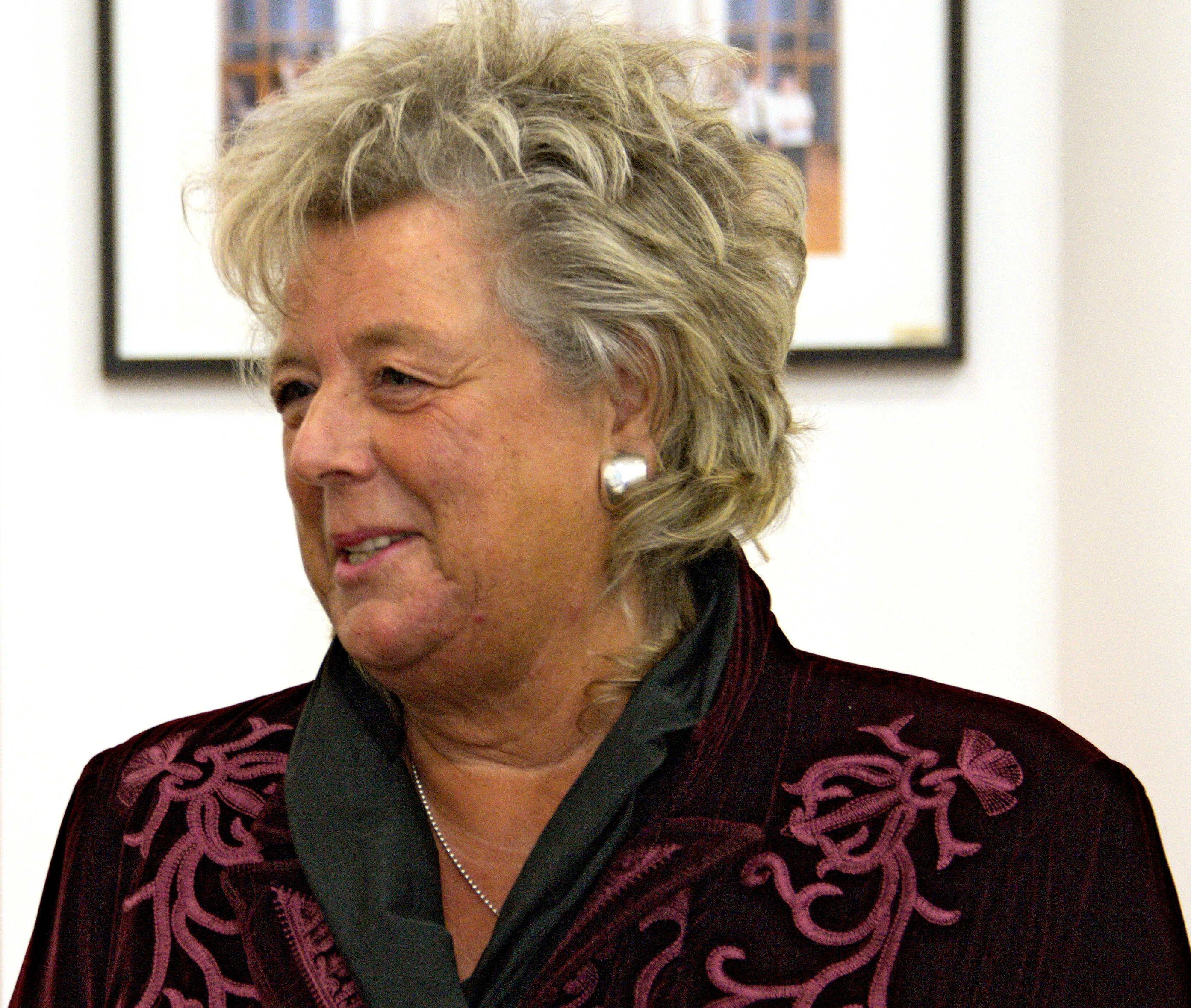 D'Kulturministesch Maggy Nagel den 18. Oktober 2015 bei der (drëtter) Inauguratioun vun der Munerefer Synagog.